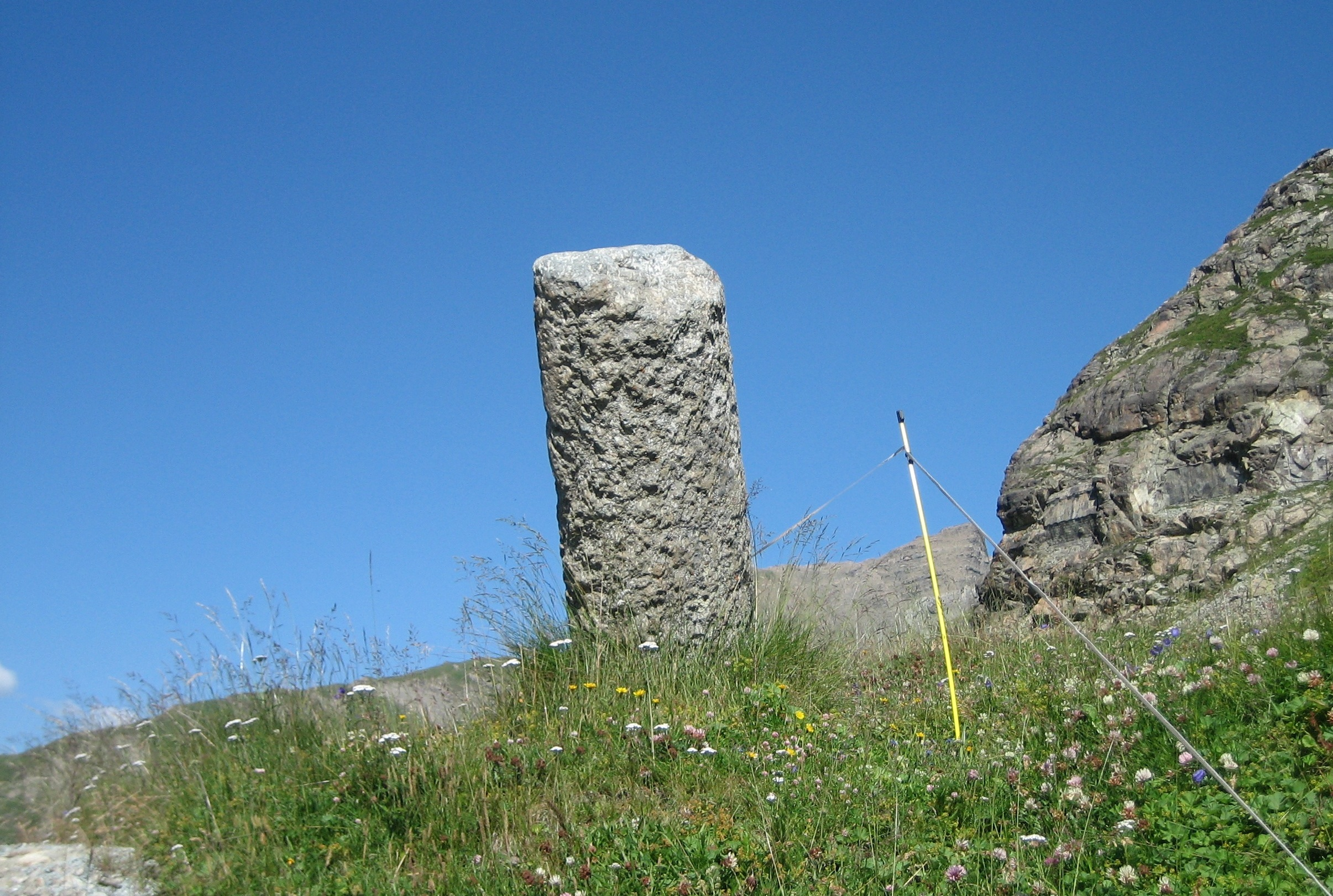 Römische Säule auf der Julierpasshöhe und Bunker Julier links A 7686